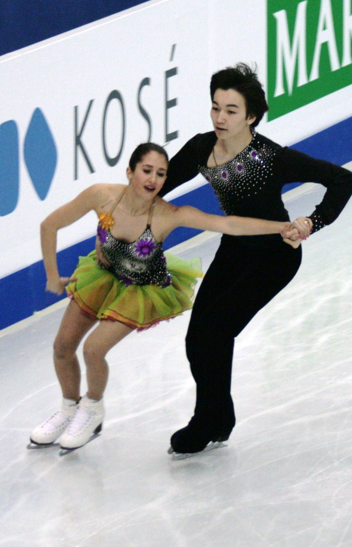 Кортни Мансур и Дарын Жунуссов (Казахстан) на чемпионате мира по фигурному катанию 2012, предварительный раунд.